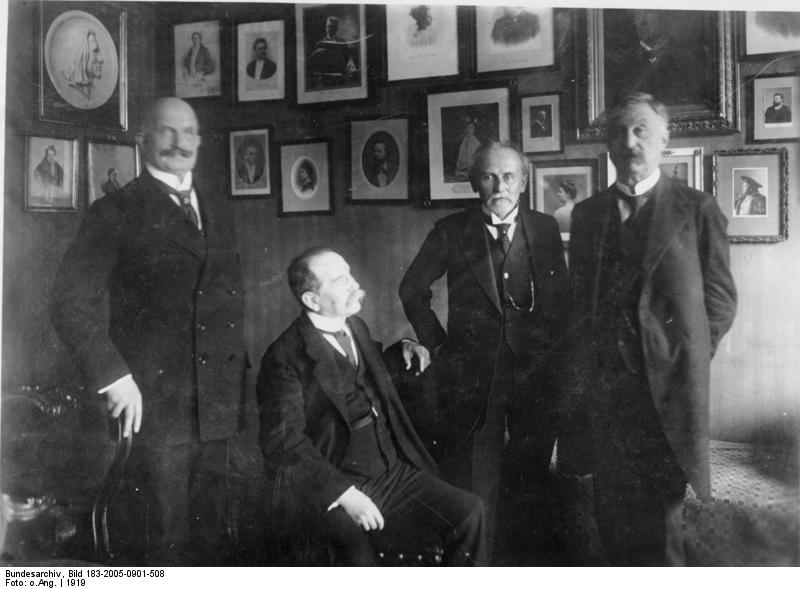 ADN-ZB/ Archiv Das Präsidium der Deutschen Nationalversammlung [1919]; von links: [Hermann] Dietrich; [Konrad] Haussmann, [Eduard] David, [Constantin] Fehrenbach: 1629-19 [Scherl Bilderdienst]